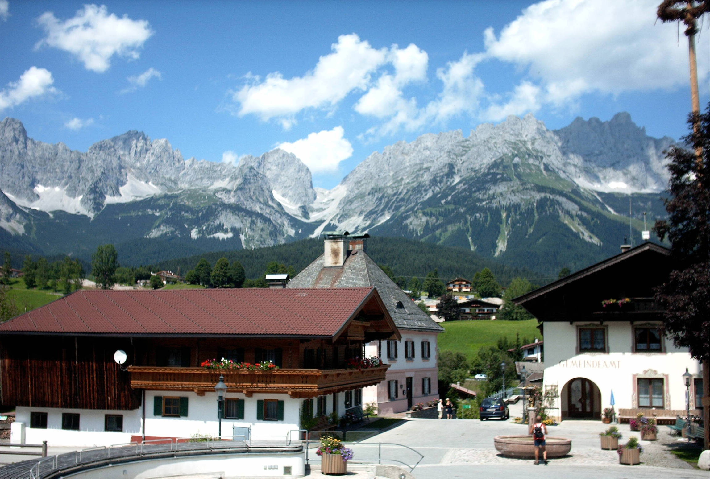 Going am Wilden Kaiser